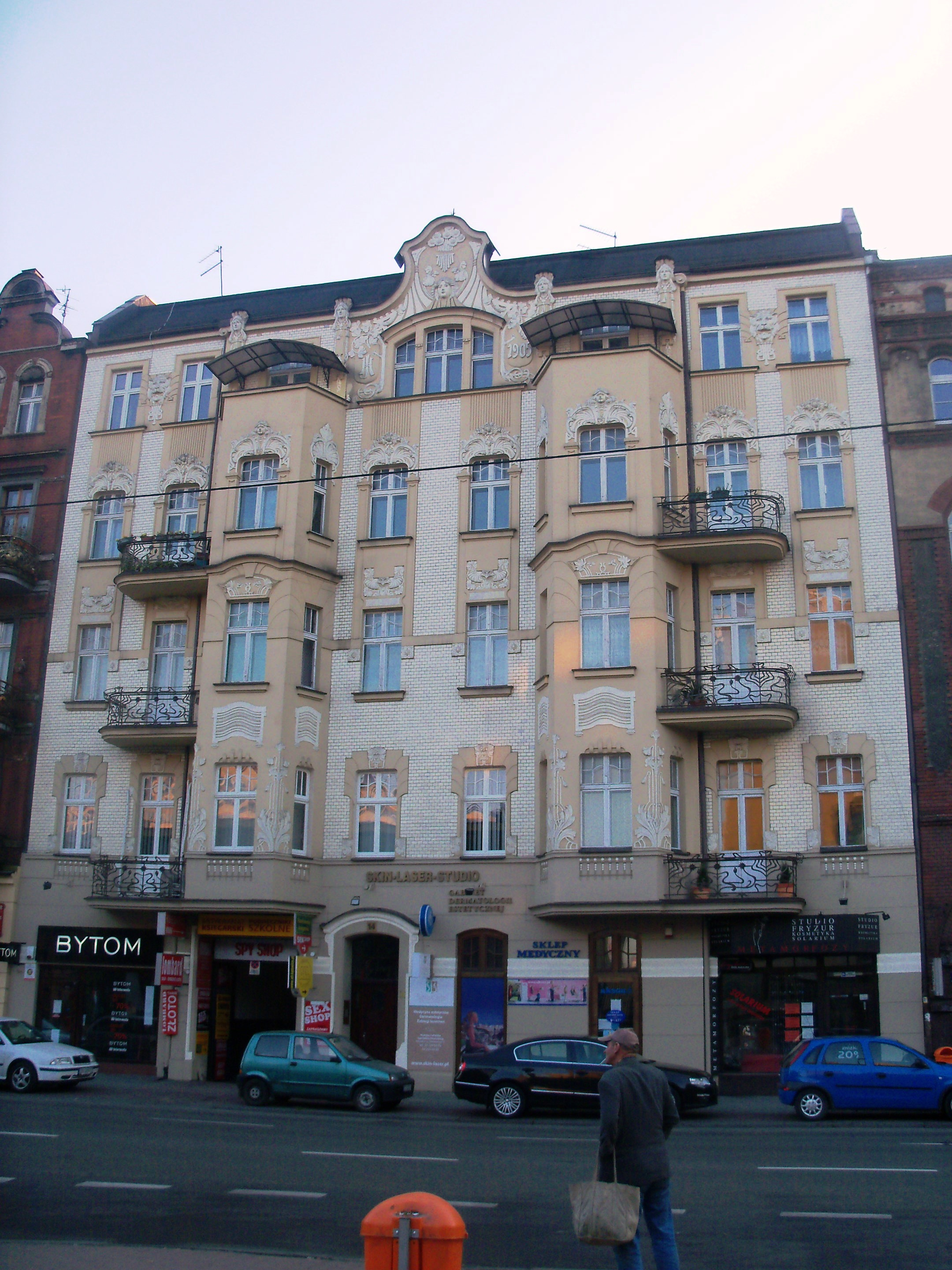 Kamienica przy ul. Mickiewicza 14 w Katowicach